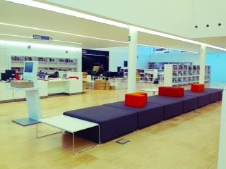 Biblioteca Pública Carles Rahola de Girona. Des 2014